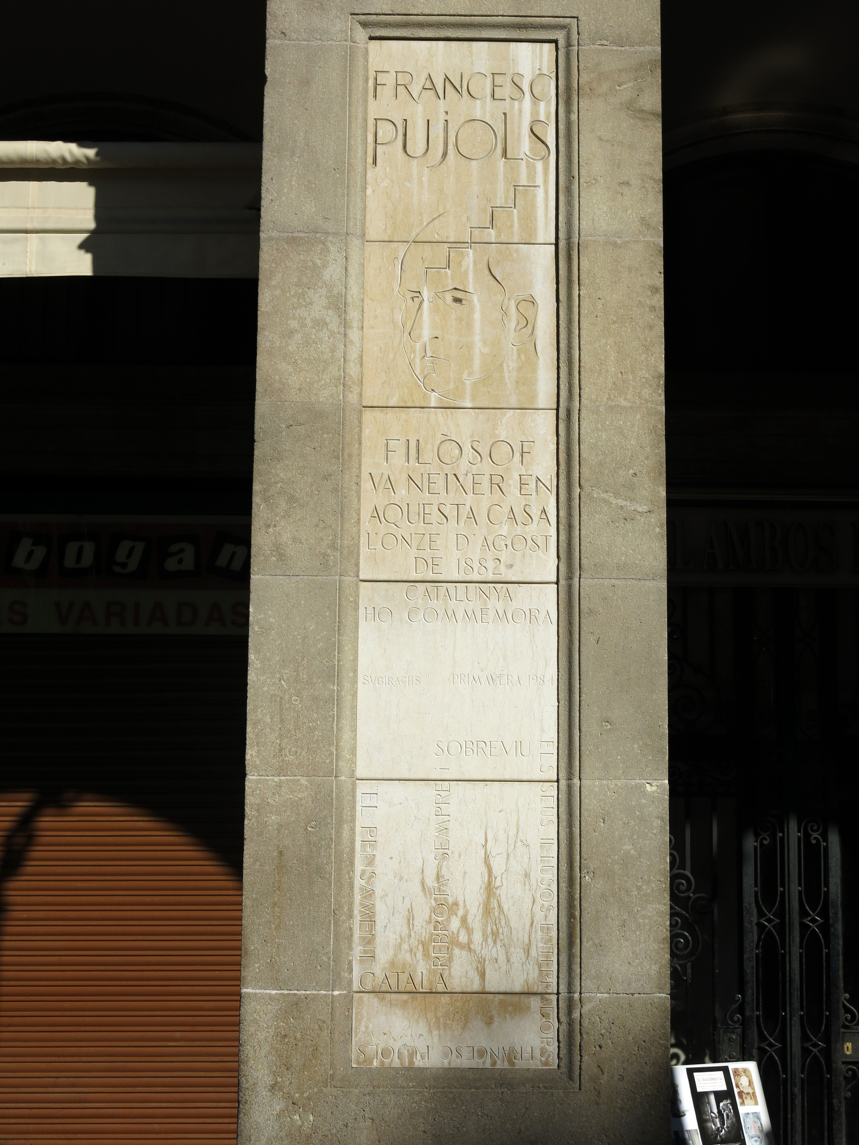 A Francesc Pujols. Pl. Reial, 10 (Barcelona)